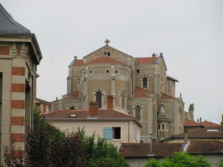 Trévoux, arrière de l'église de style néo-roman, construite de 1899 à 1904. Vue prise depuis l'office de tourisme